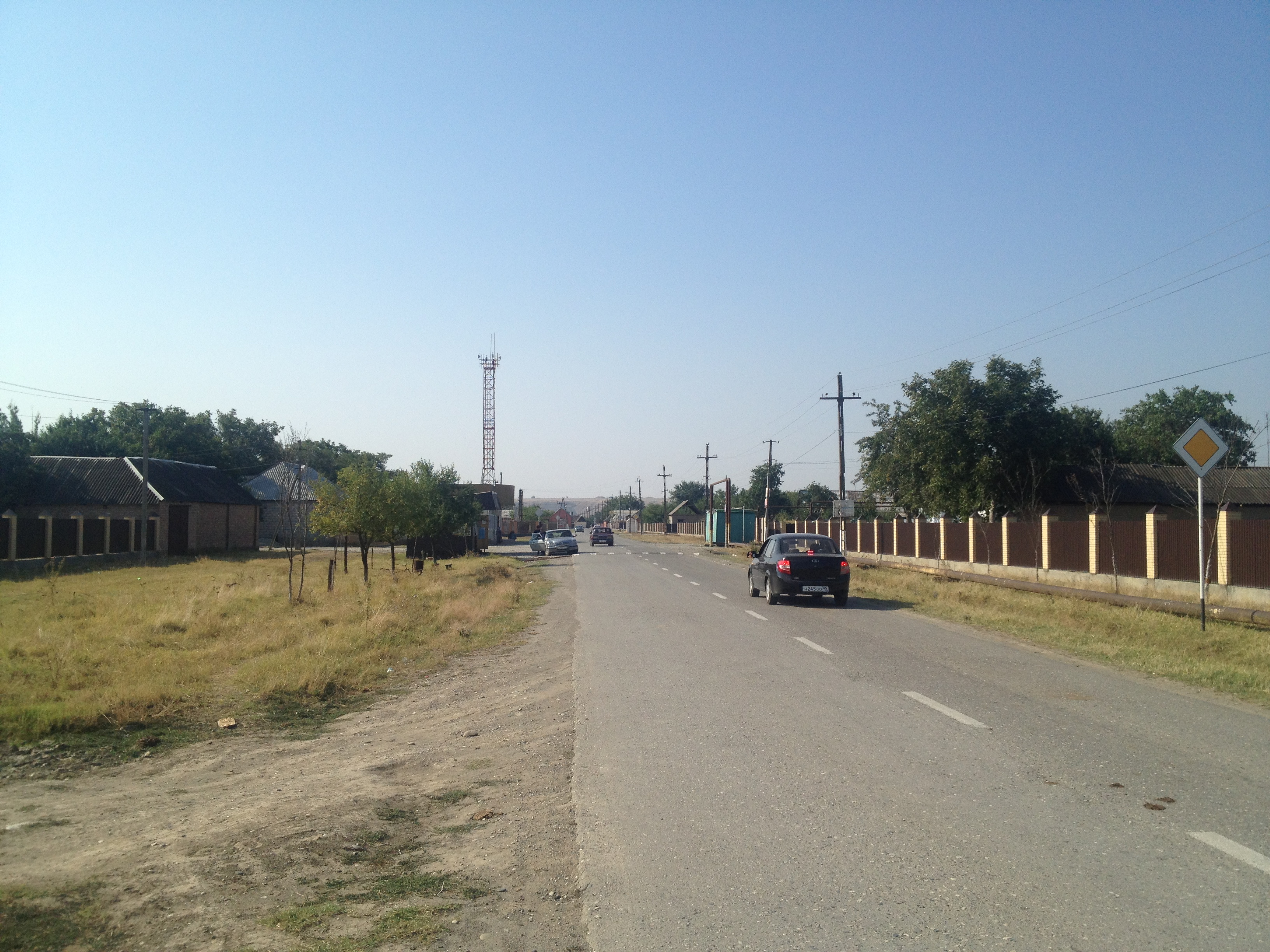 село Левобережное